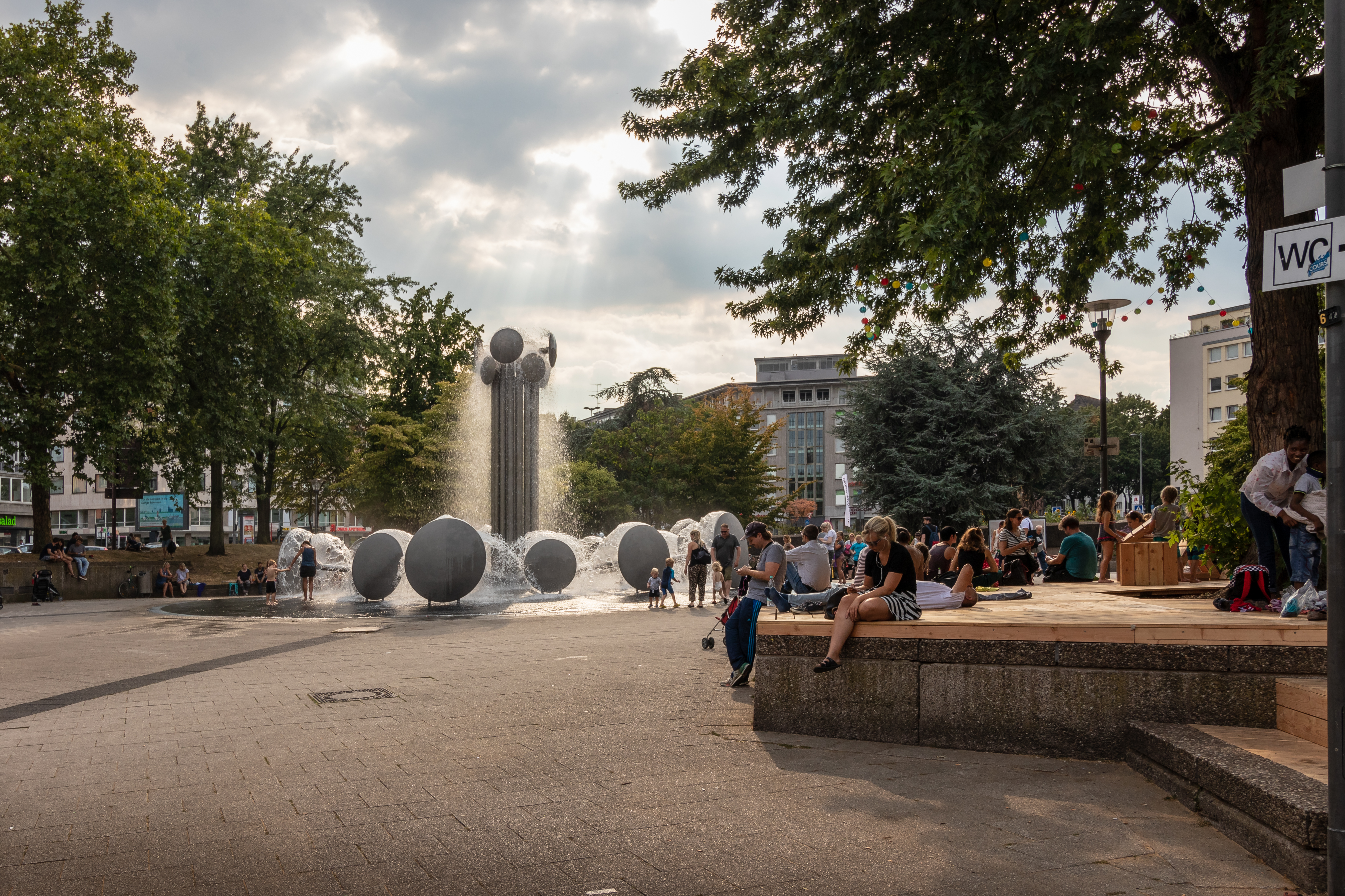 Wasserkinetische Plastik von Wolfgang Gödderz auf dem Ebertplatz, in Betrieb